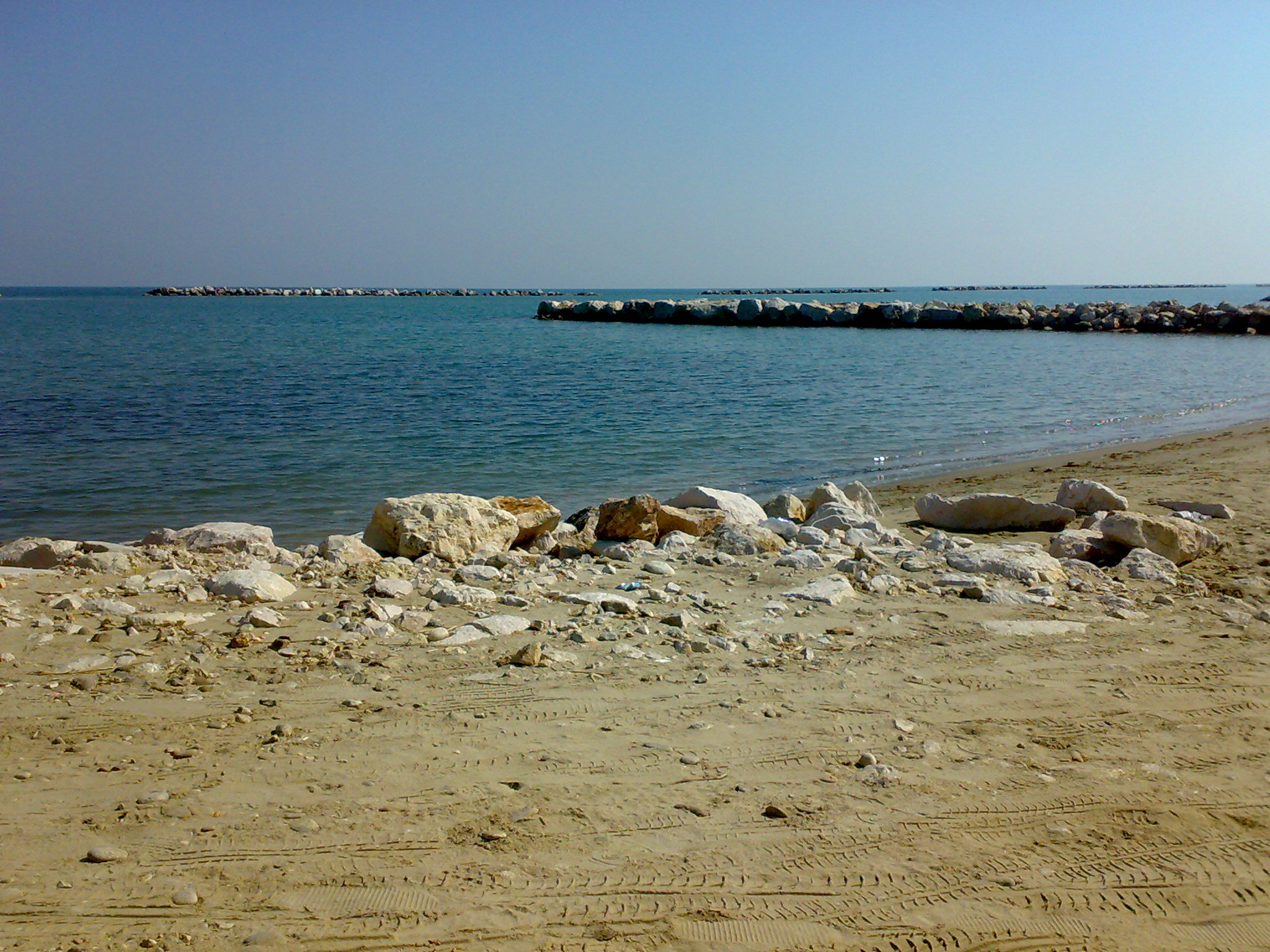 CAMPOMARINO (CB)